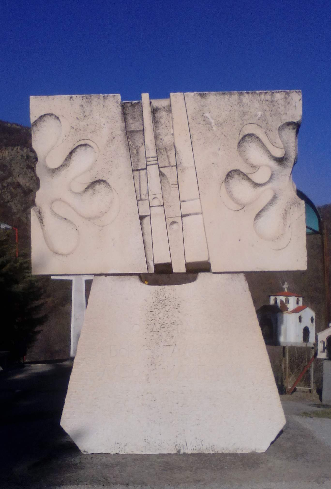 Споменик на Плетвар на местото на убиството на Борка Талески и Лазо Филипоски - Колески